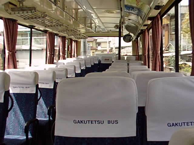 Inside of Gakunan Tetsudo Bus Nissan Diesel U-UA440LSN